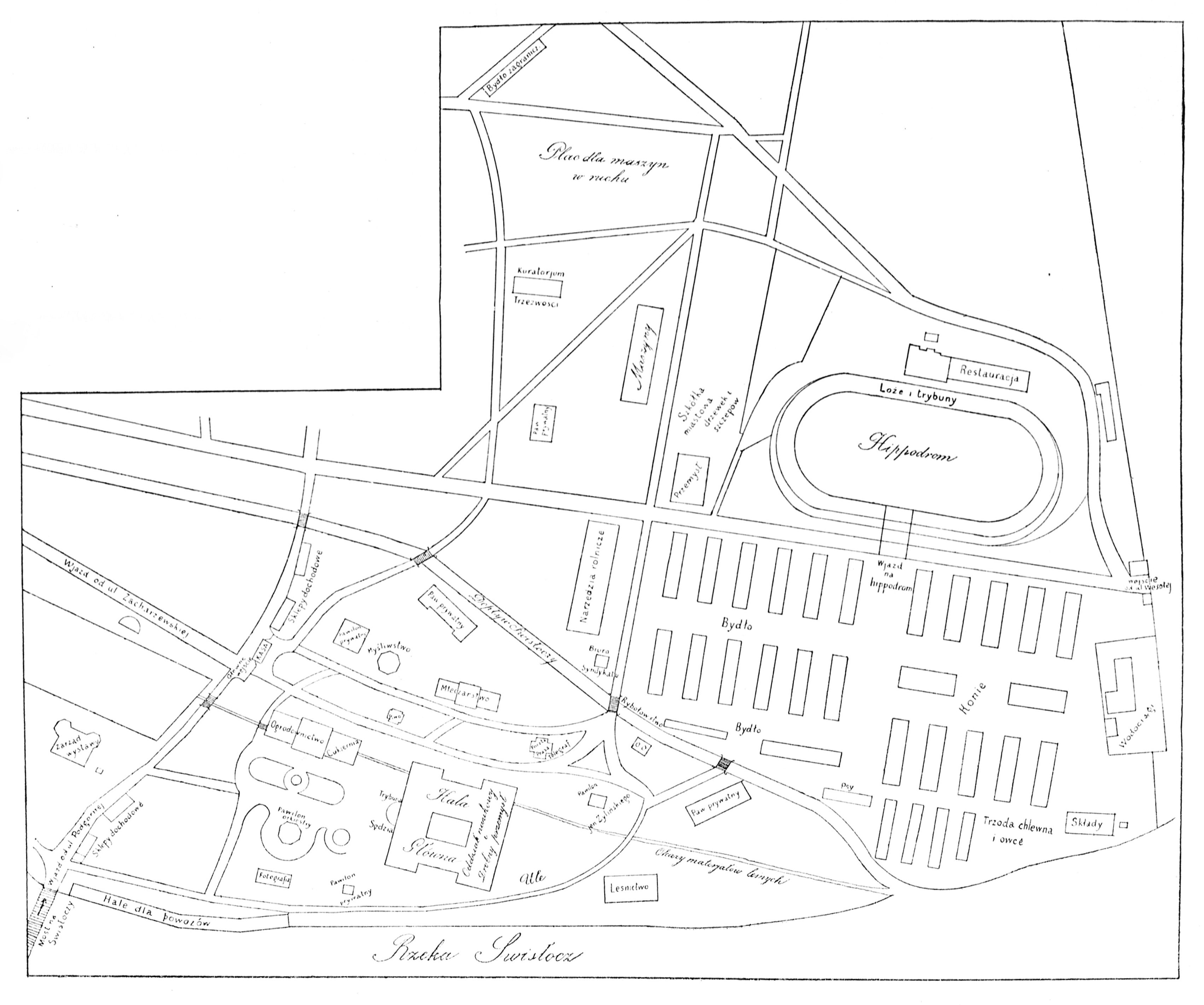 Беларуская (тарашкевіца): Менск (Miensk), Мескі Сад (Mieski Sad). Выстава сельскай гаспадаркі, плян